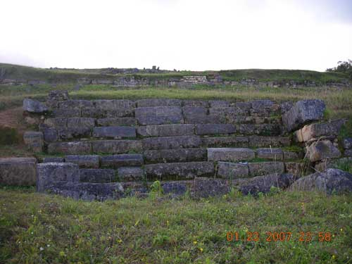 San Pedro-Pacopampa